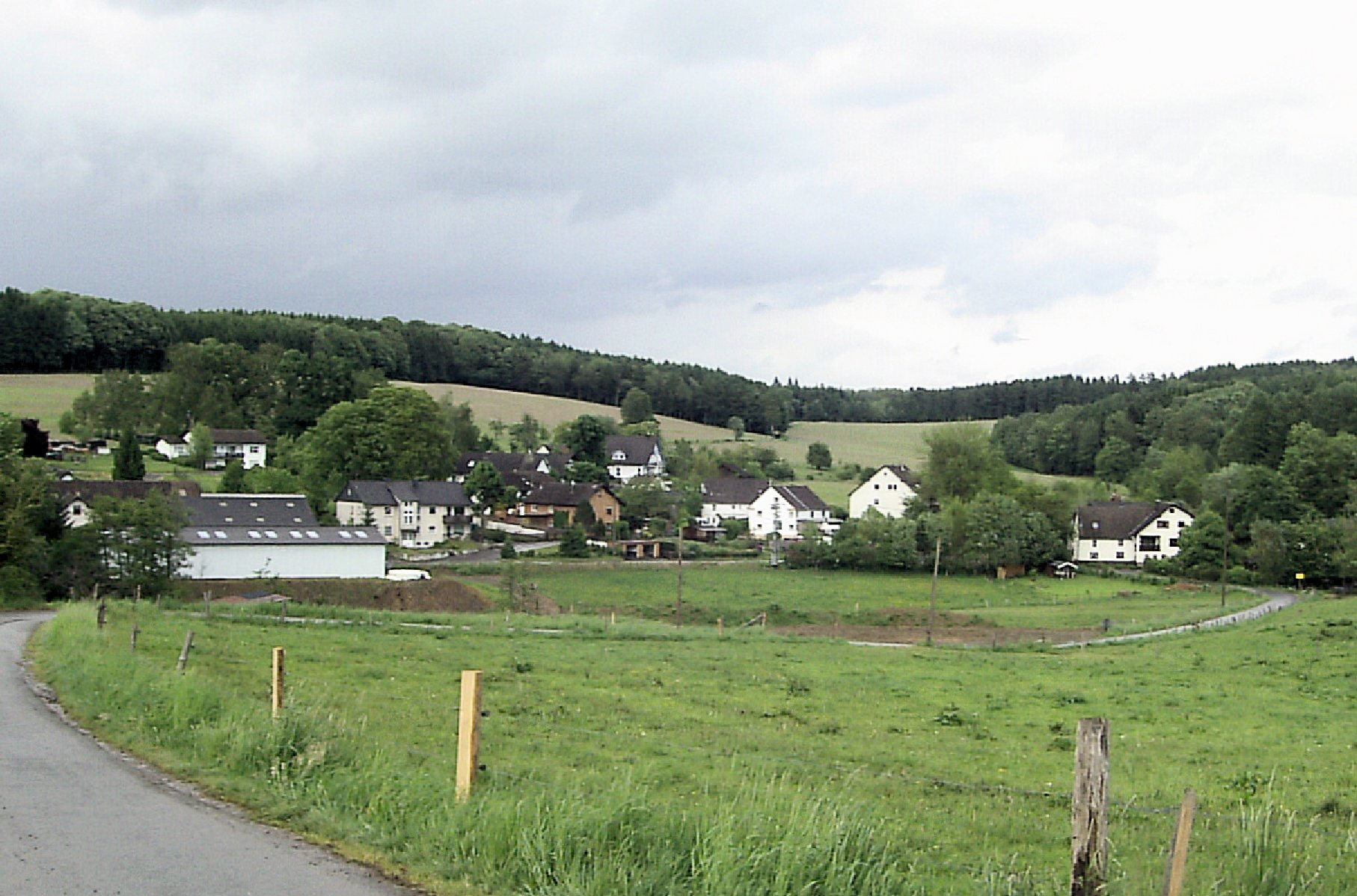 Blick auf Haan, Gemeinde Nümbrecht, Nordrhein-Westfalen, Deutschland